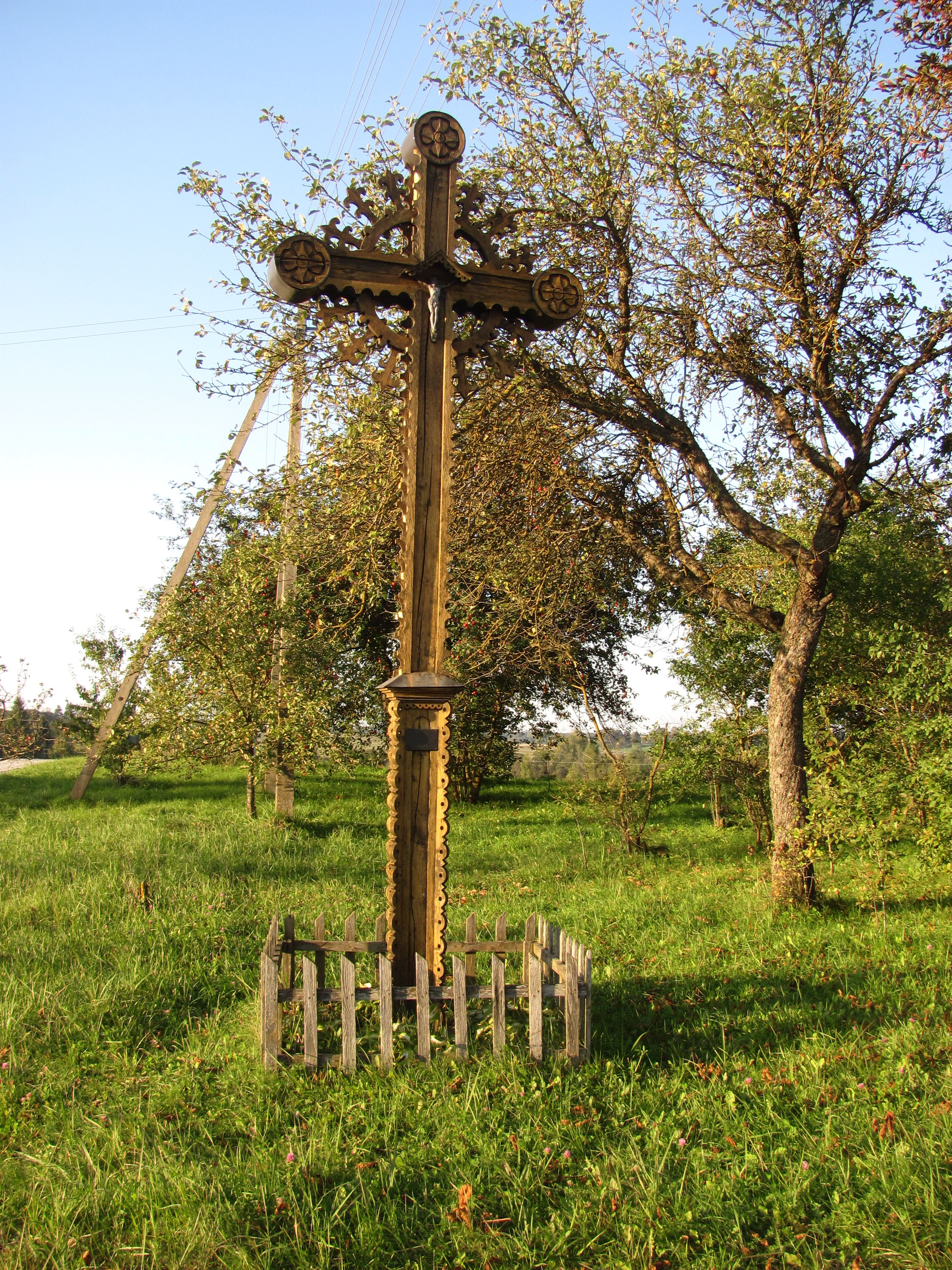 Utenos sen., Lithuania